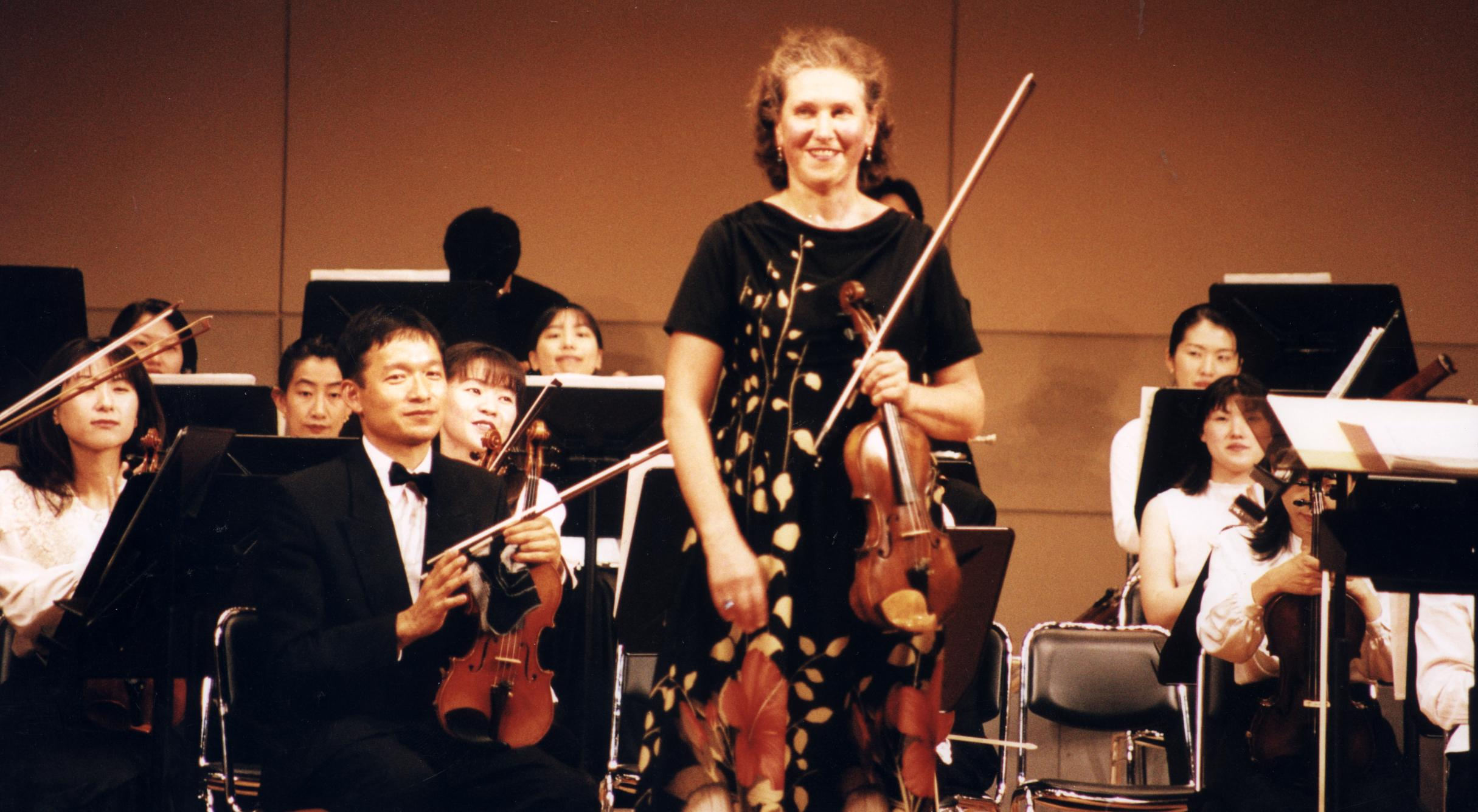 Prof.Jela Špitková v Japonsku Licensing Opis Prof.Jela Špitková v Japonsku Zdroj: Jela Špitková, osobne Prof. Jela Špitková povoľuje použitie tohto obrázka celosvetovo.